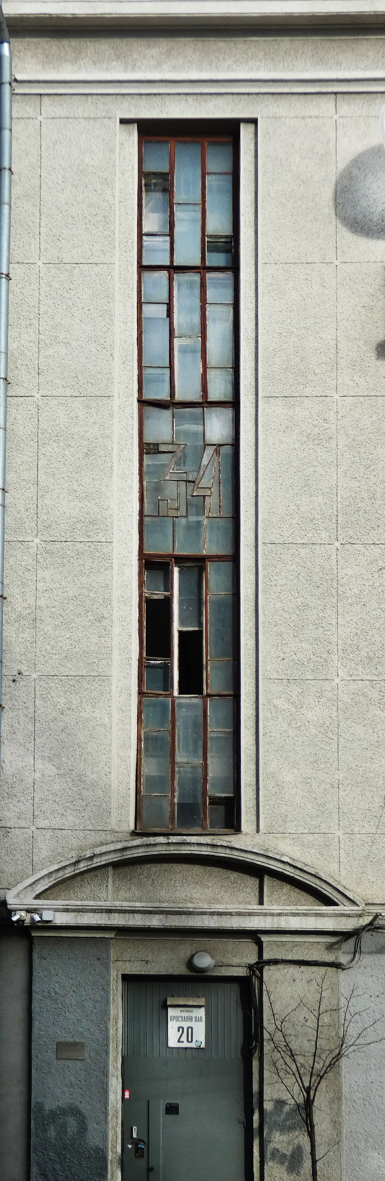 Будинок для співробітників комітету резервів при Раді праці та оборони. Вулиця Ярославів Вал, 20. Київ